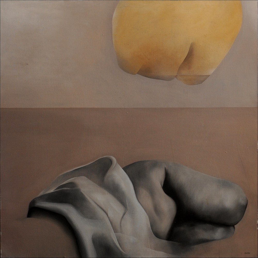 Photo d'un tableau contenu dans le répertoire des oeuvres de Pierre Saint-Paul élaboré par Philippe HENRION